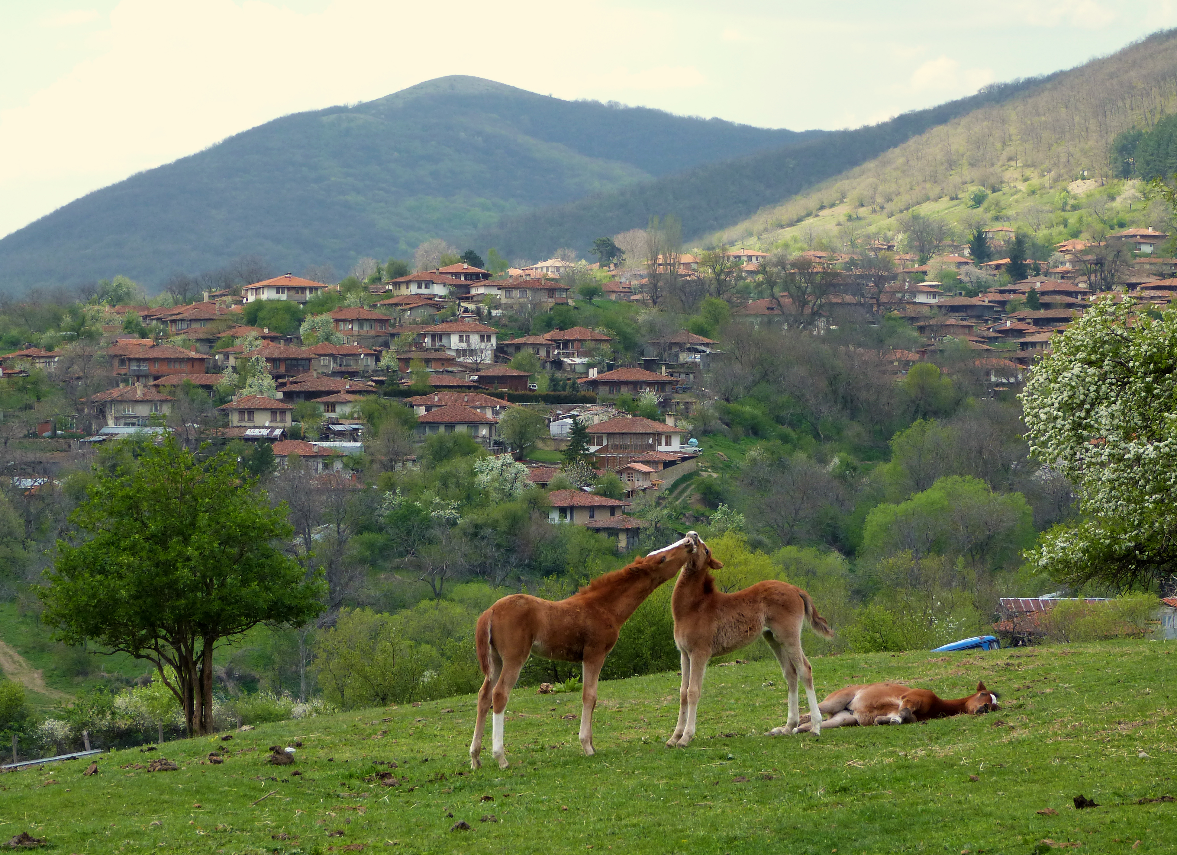 Село Жеравна